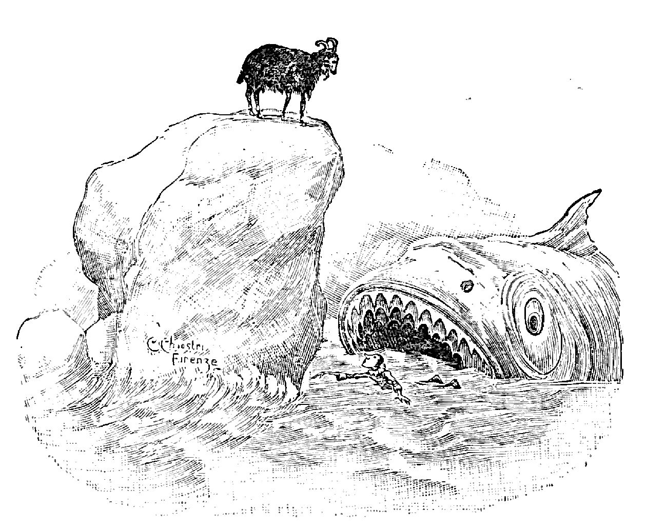 Illustrations from "Le avventure di Pinocchio, storia di un burattino", Carlo Collodi, Bemporad & figlio, Firenze 1902 (Drawings and engravings by Carlo Chiostri, and A. Bongini)